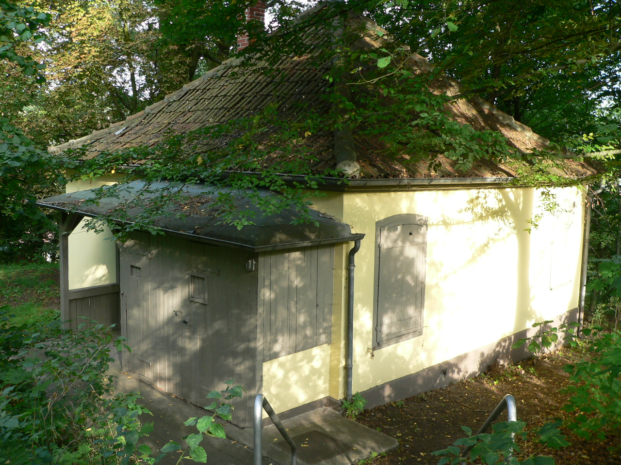 Jean-Paul-Haus in Coburg auf dem Adamiberg 6, Wirkungstätte des Dichters 1803-1804